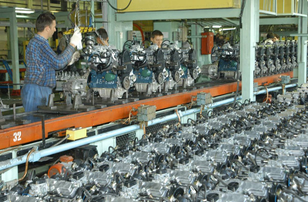 Мелитопольский моторный завод